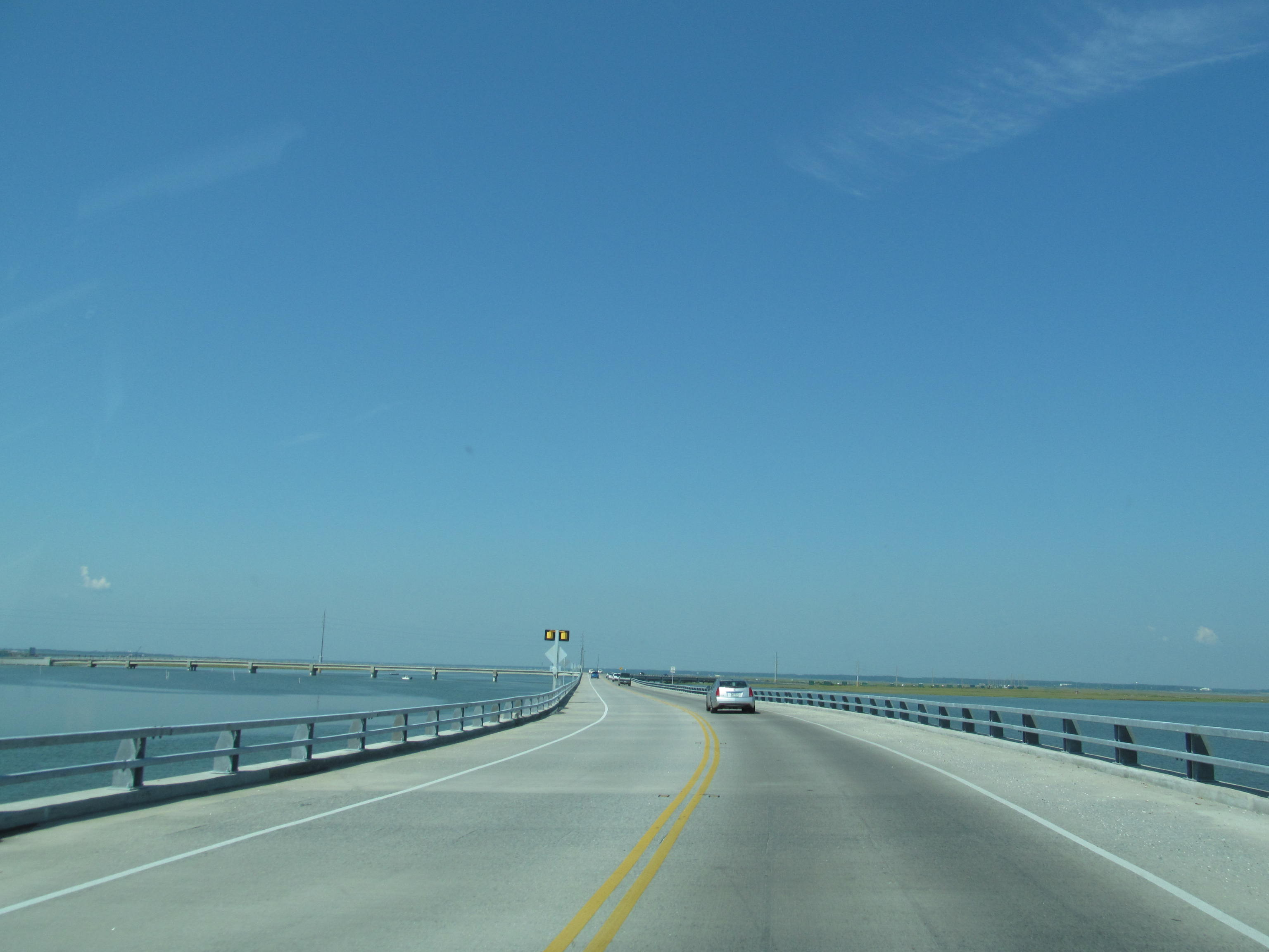 Virginia State Route 175